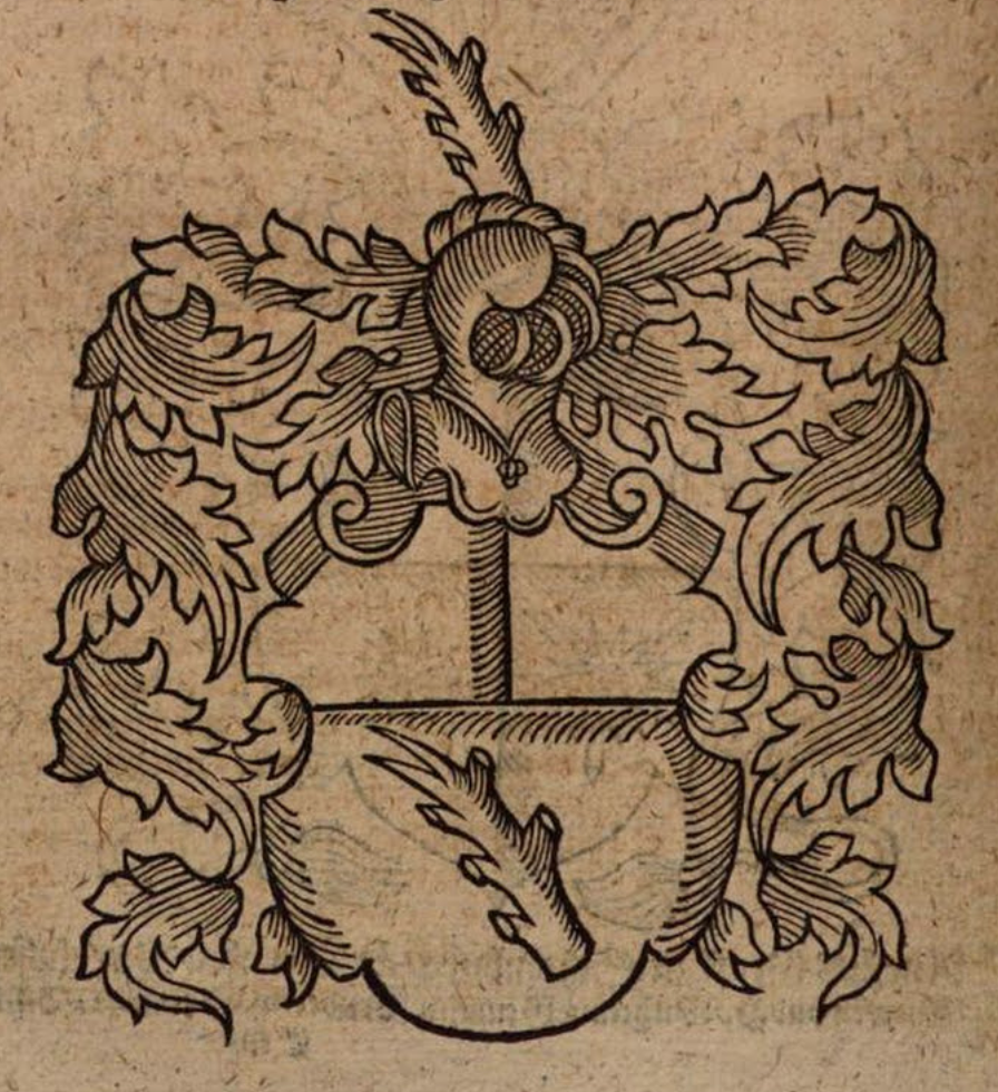 Wappen des Hildesheimer Fürstbischofs Henning vom Haus (1423-1488).